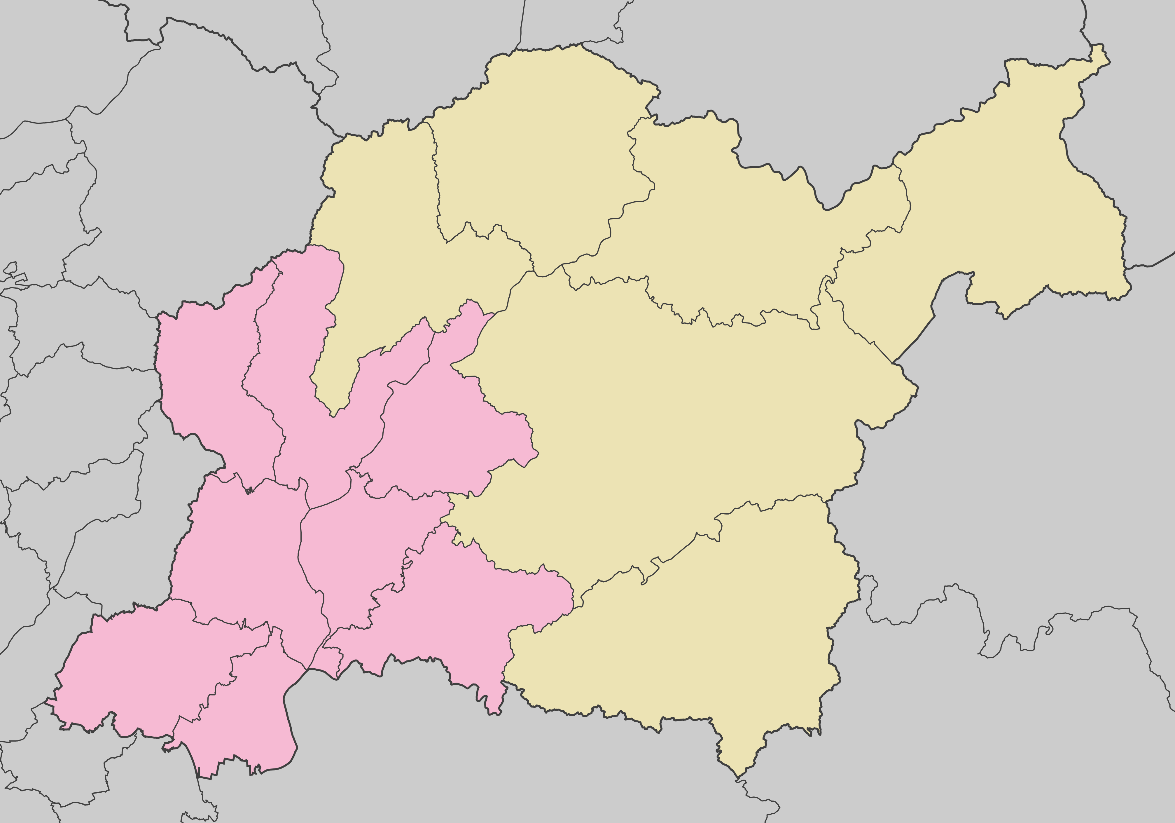 豊田市地域図（2019年（平成31年）4月現在）